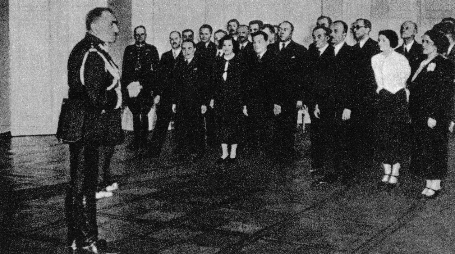 Nowo mianowany premier, Felicjan Sławoj Składkowski, przemawia do urzędników Prezydium Rady Ministrów.